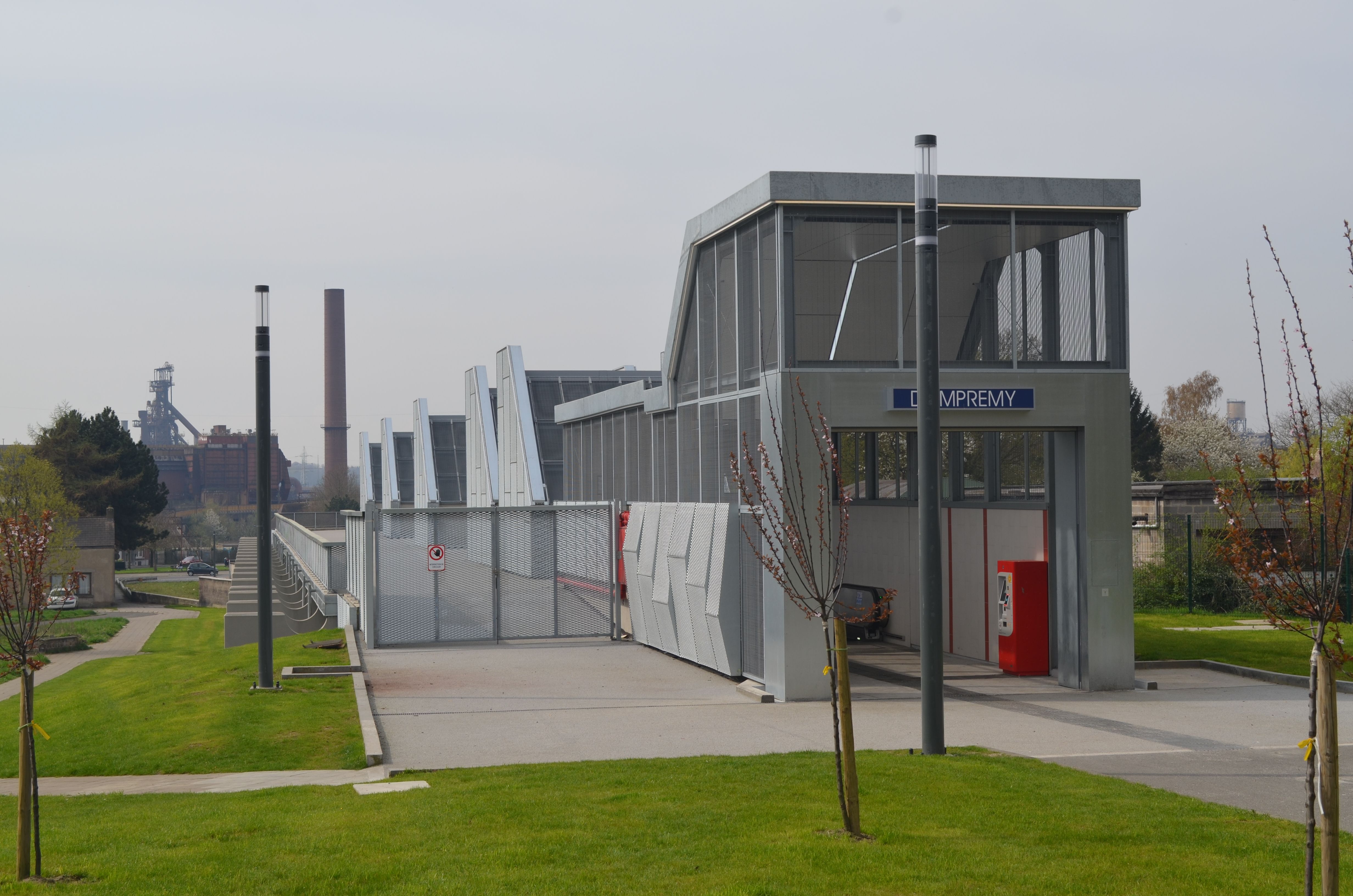 Dampremy (Charleroi - Belgique) - station du métro léger de Charleroi - entrée côté rue Paul Janson après la rénovation de 2017-2018.